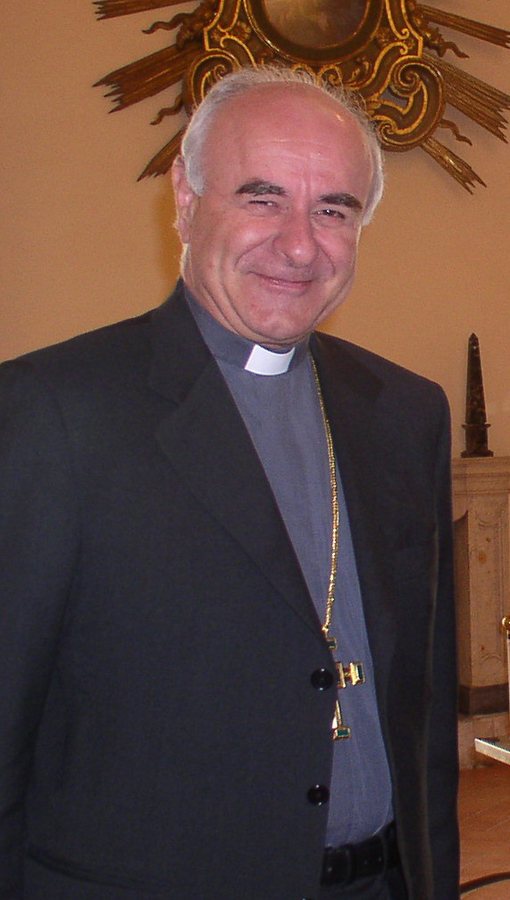 Mons. Vincenzo Paglia, vescovo di Terni-Narni-Amelia